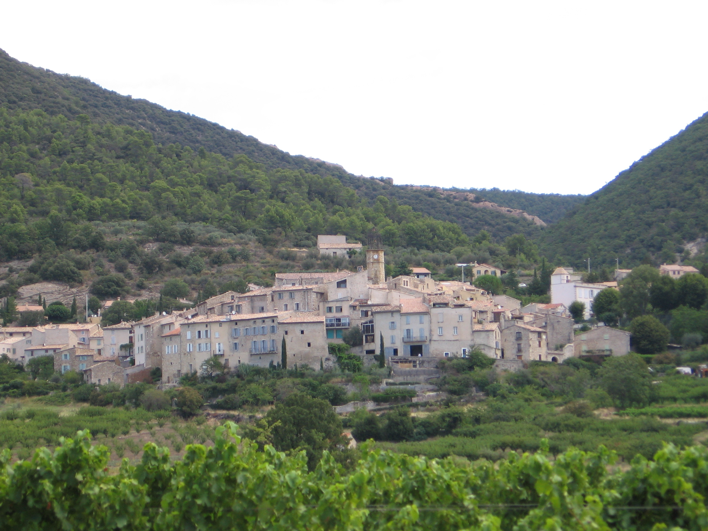 Venterol, France